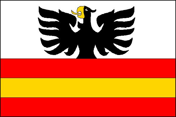 Vlajka obce Loděnice (okres Brno-venkov)